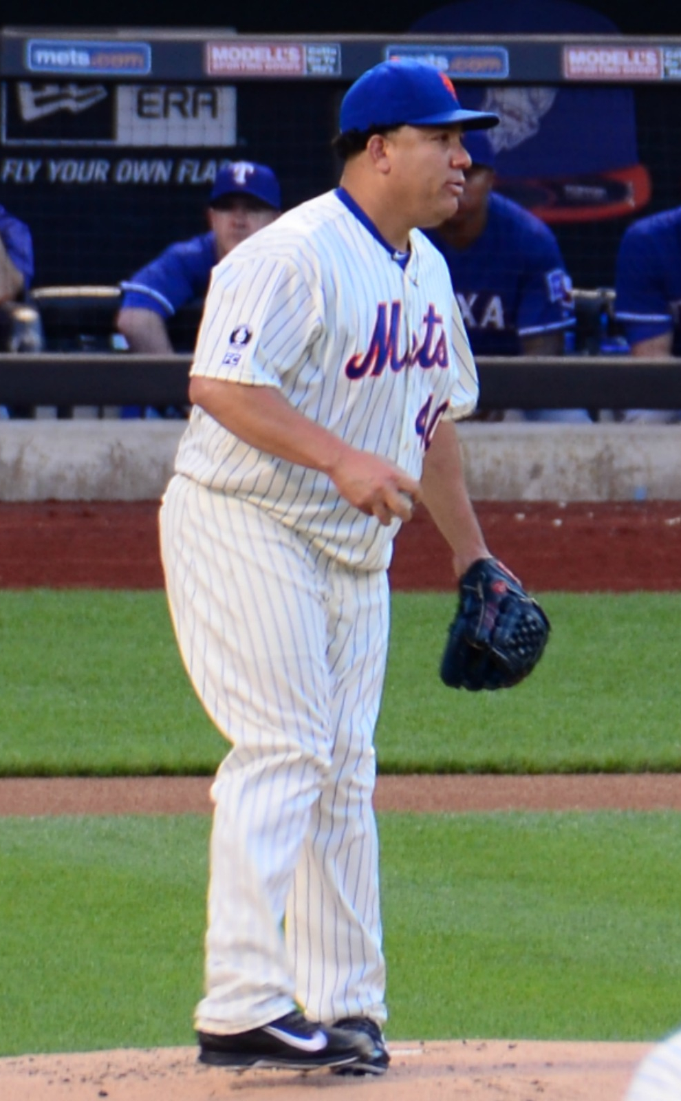 Bartolo Colón